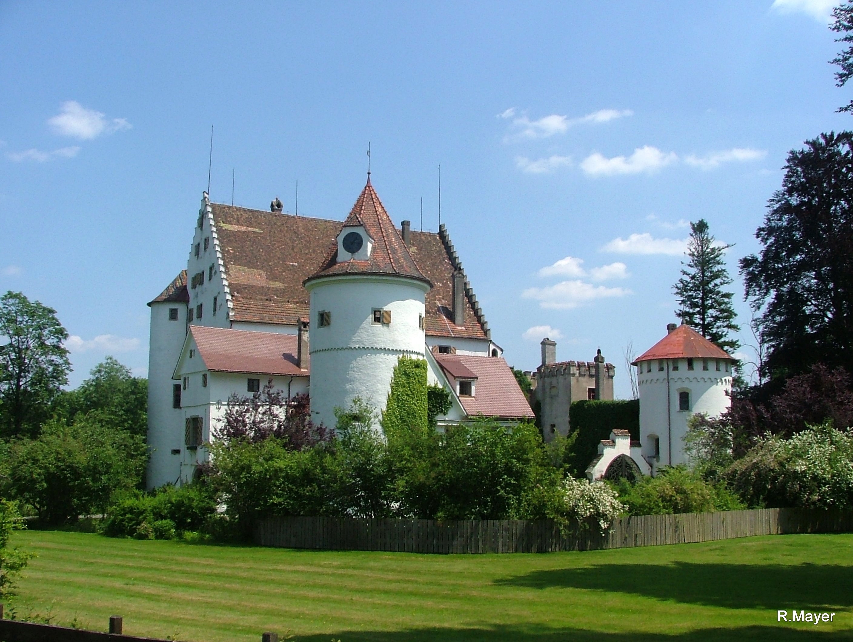 Schloss Syrgenstein